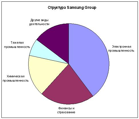 Структура корпорации Samsung Group